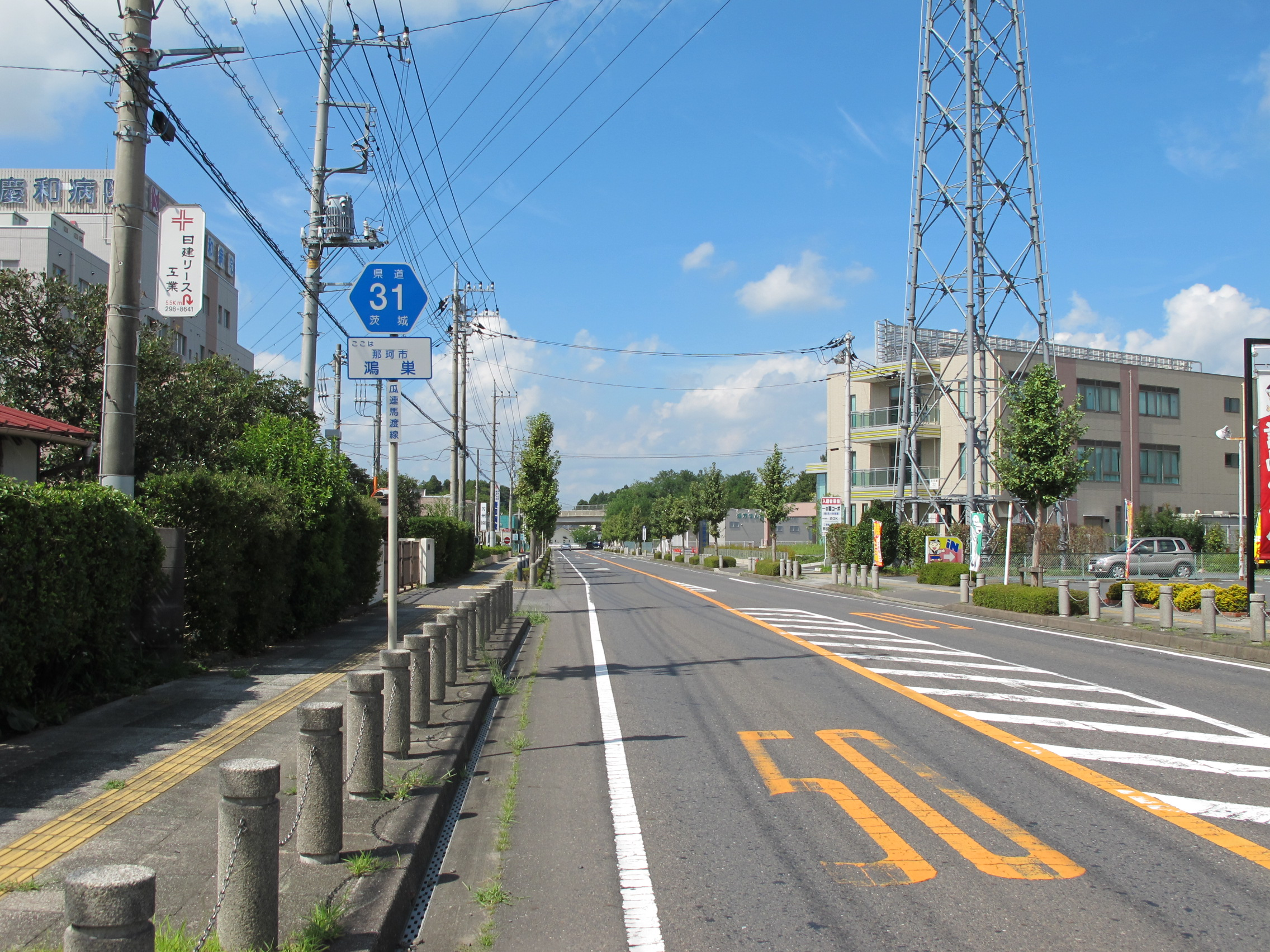 茨城県道31号瓜連馬渡線（那珂市鴻巣）